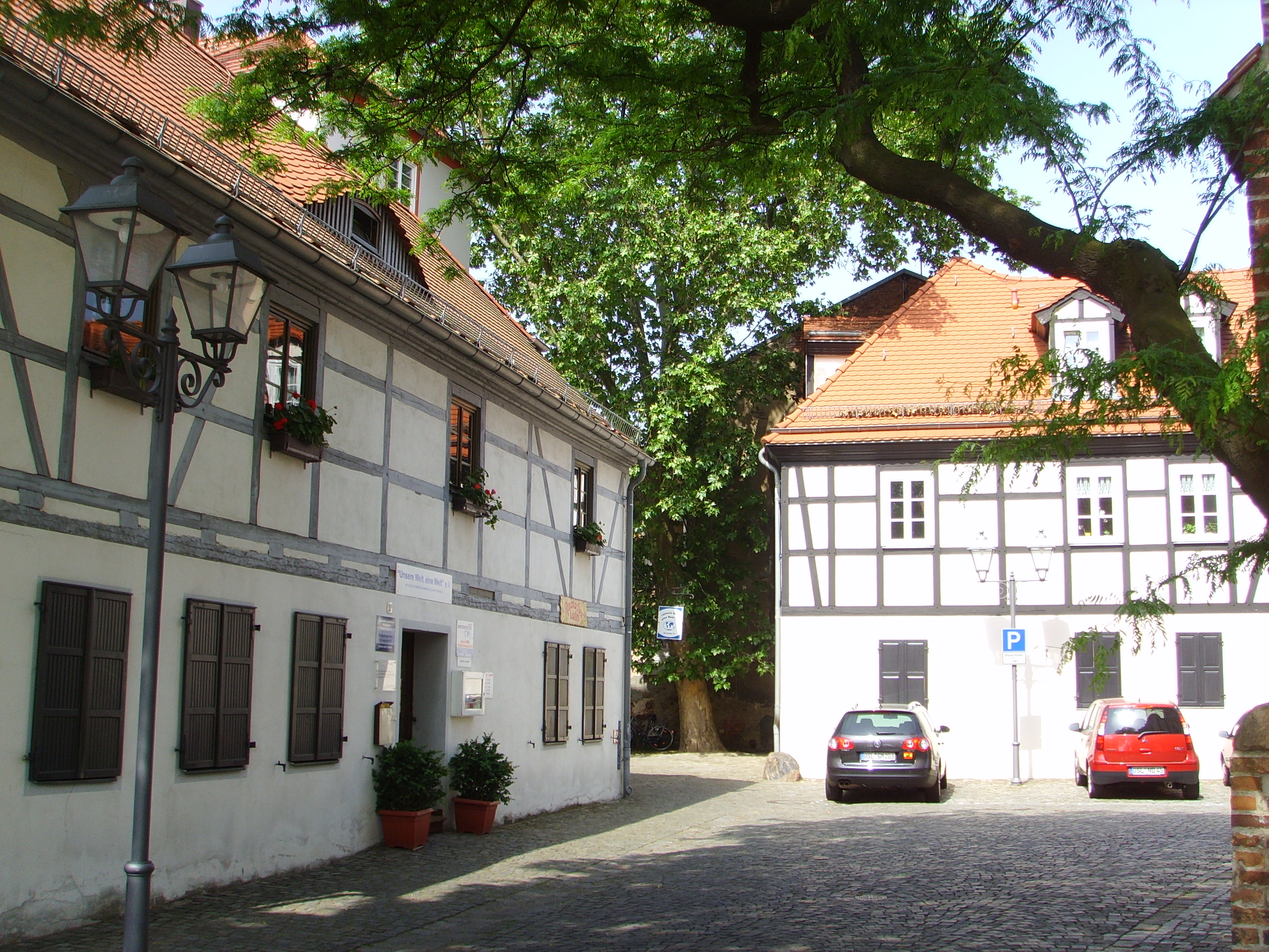 Kirchplatz in Senftenberg, altes Schulgebäude heute Fremdenverkehrsamt